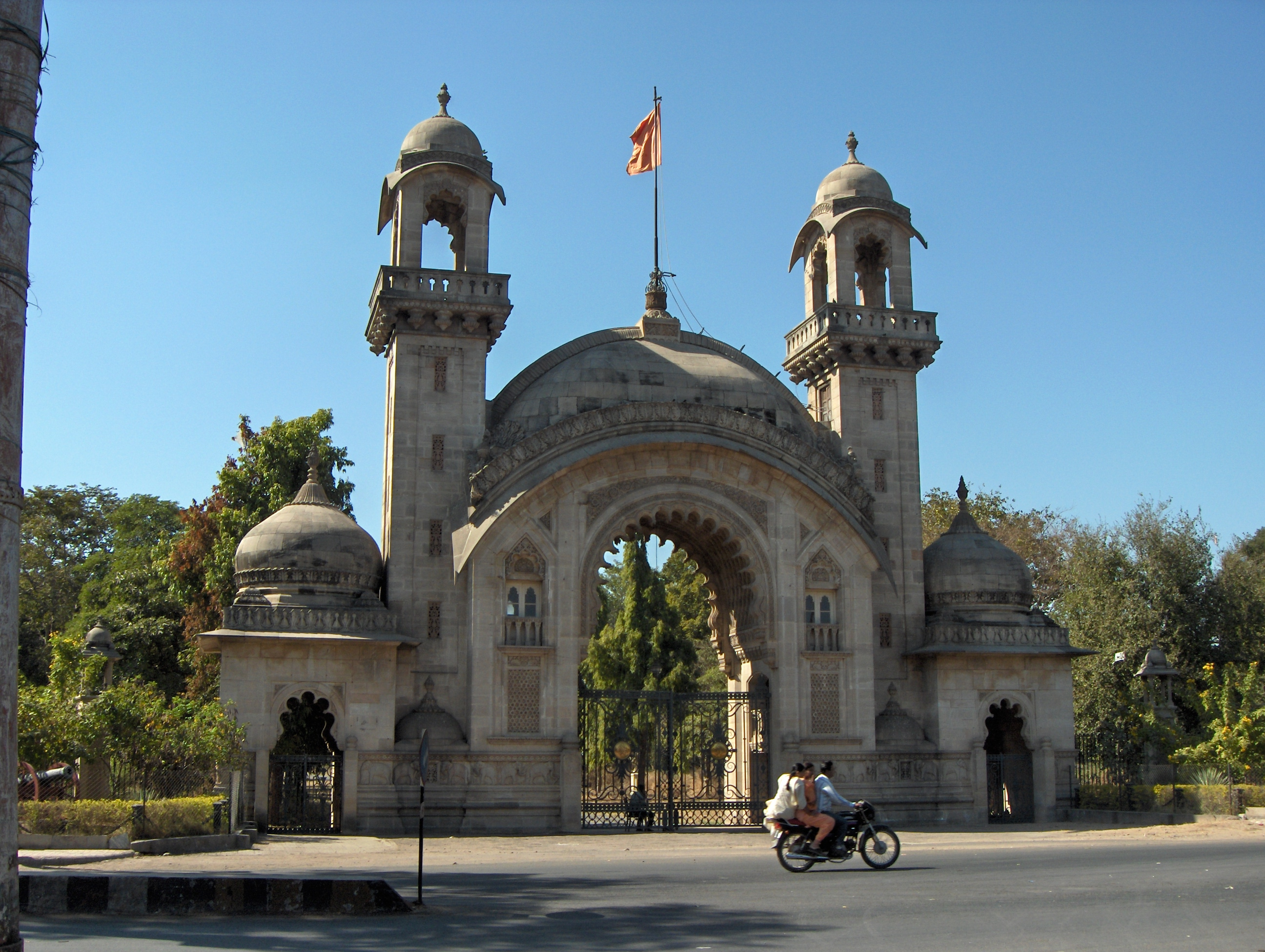 Sayajirao Palace Gates at Vadodara in Gujarat, India Pic taken by me, Nichalp on 27-Jan-2006